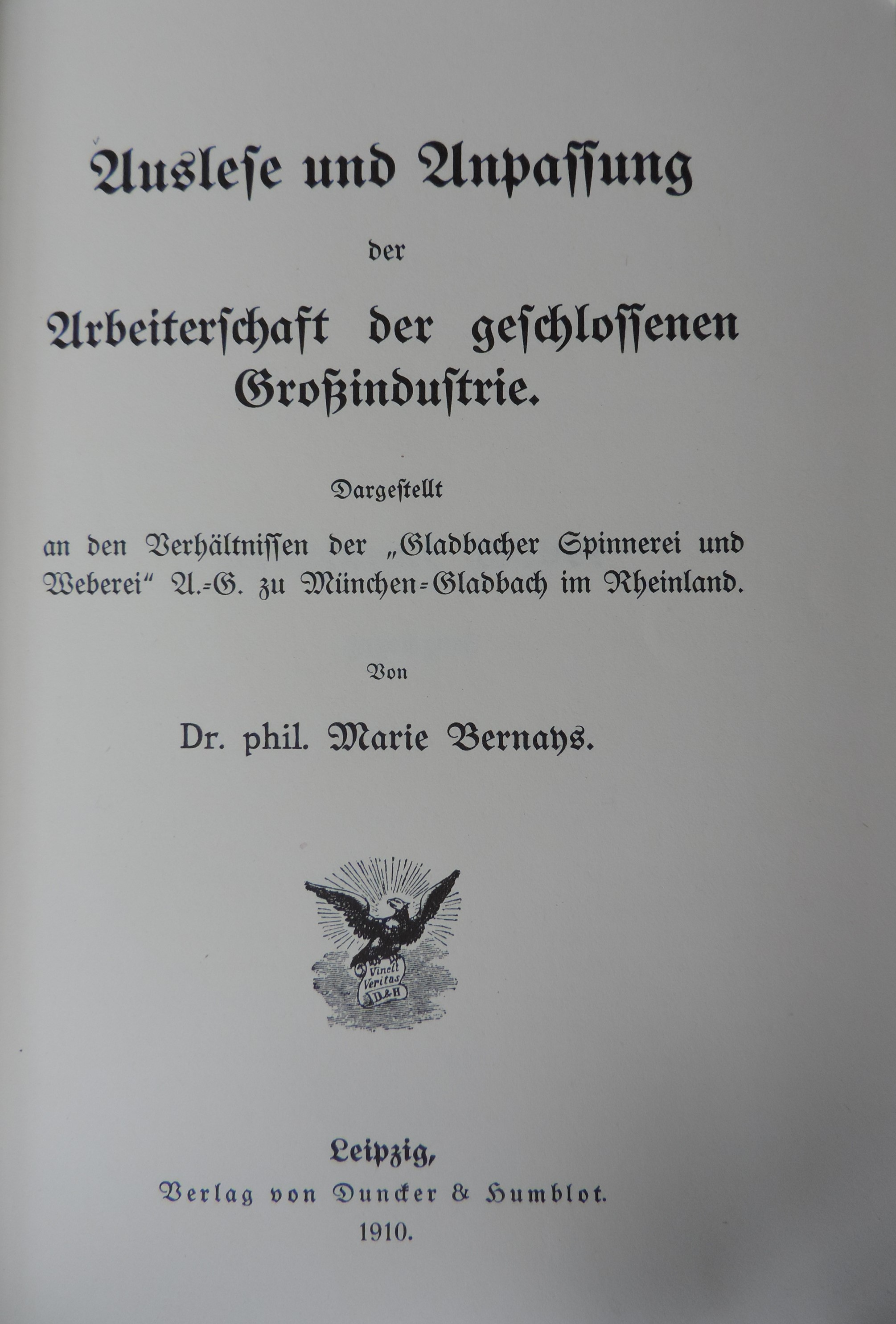 Dissertation von Maria Bernays als Buch